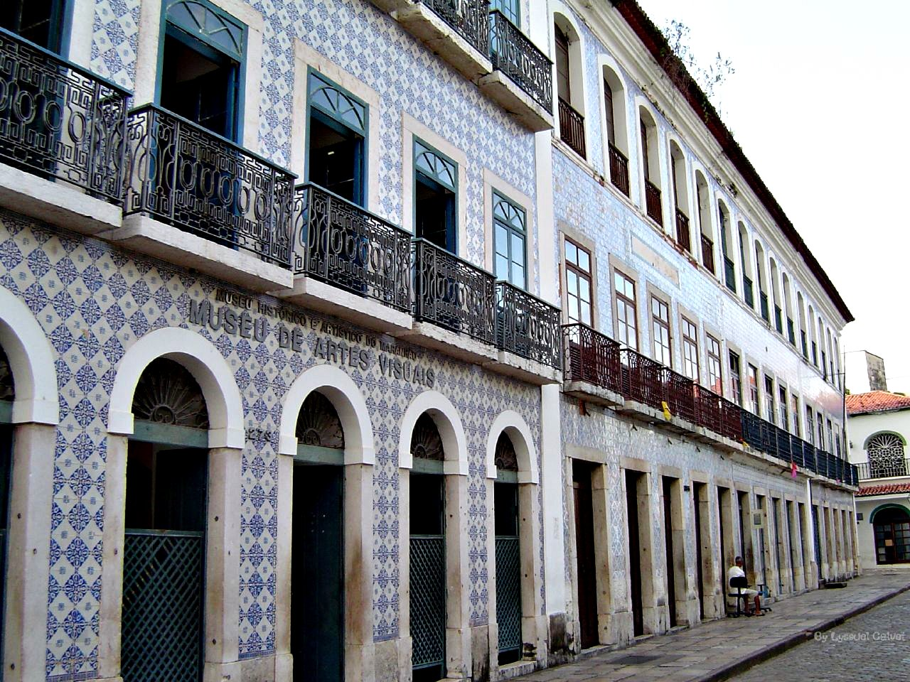 Projeto Reviver no Centro de São Luís